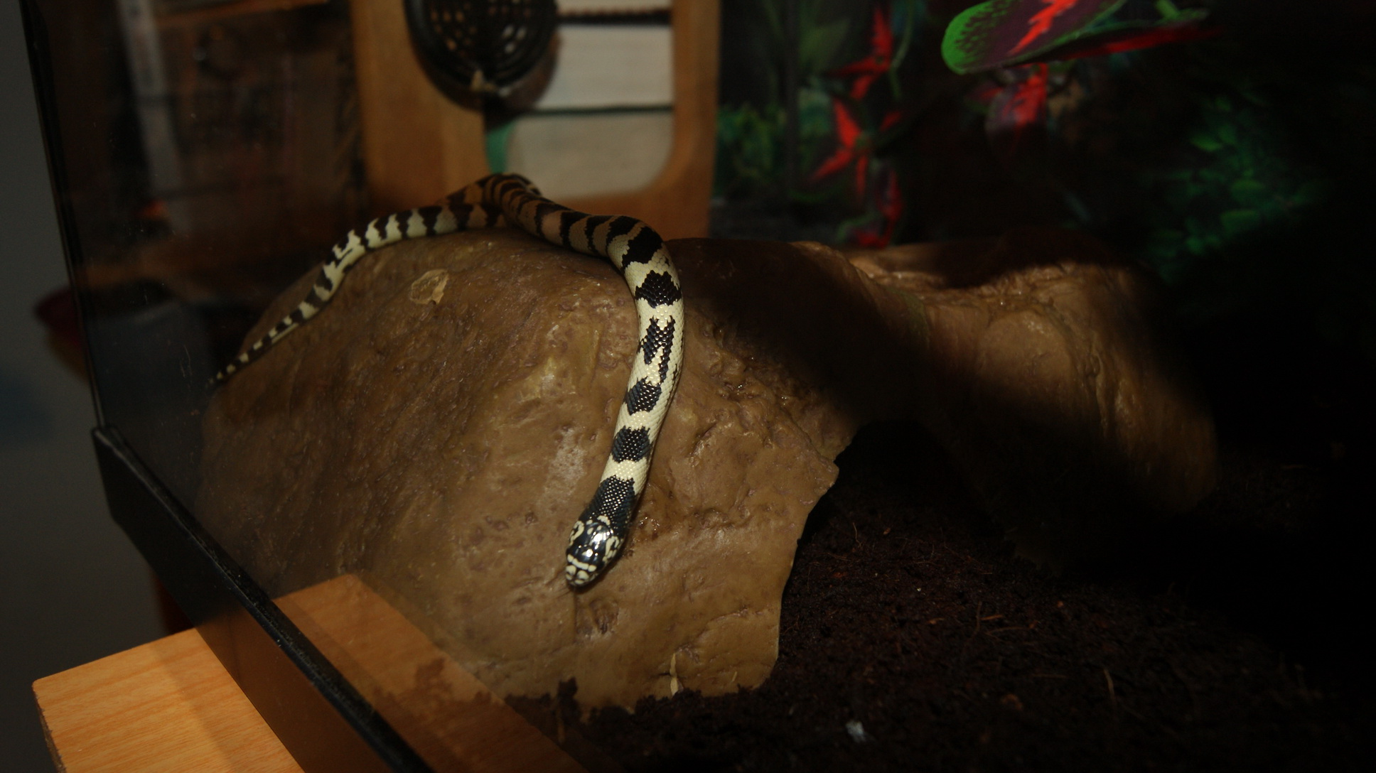 Foto de mi Lampropeltis Getula Californiae.